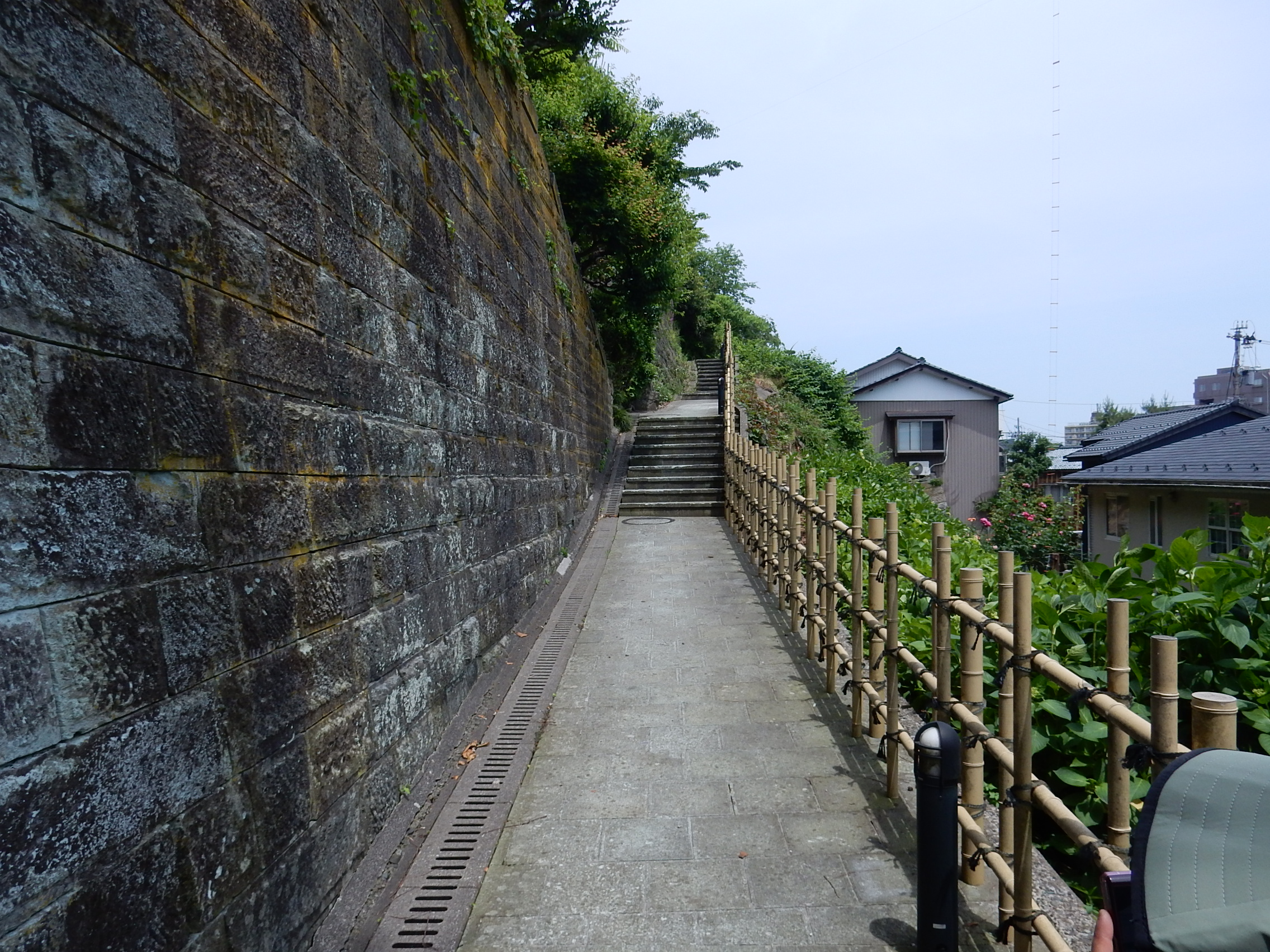 愛宕坂にある横坂